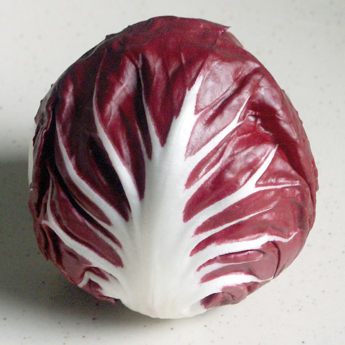 "Salade rouge" Radicchio di Chioggia - Récolte 2006